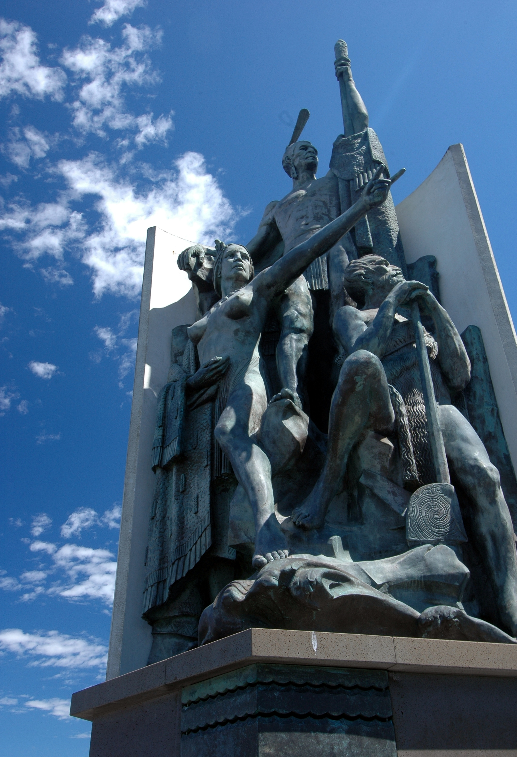 Hine Te Aparangi, Kupe Raiatea and Pekahourangi